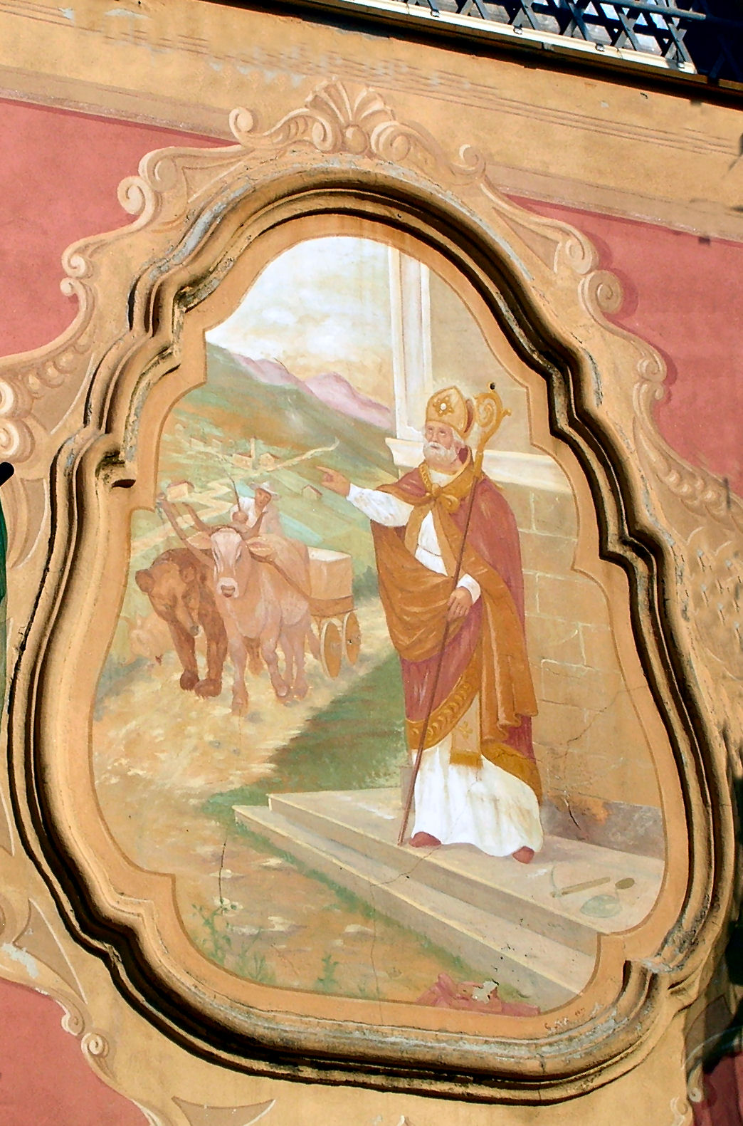 Foto propria Luglio 2008 Dipinto sulla facciata della chiesa di S. Olcese (Genova) Licensing Categoria:Chiese di Sant'Olcese